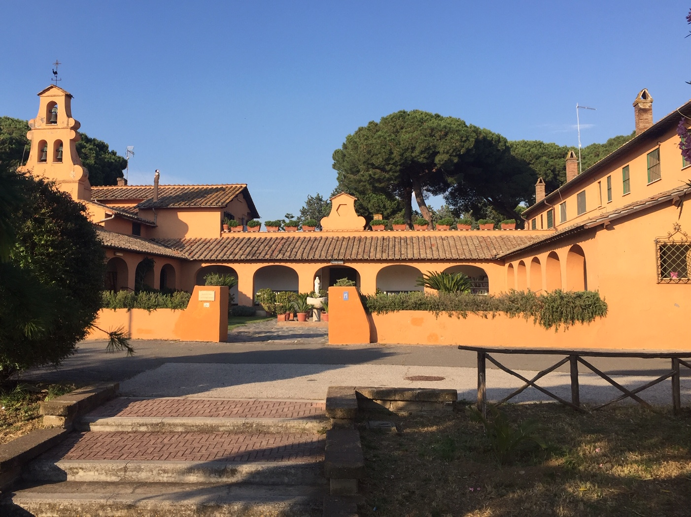 Il complesso edilizio sito a Torrimpietra edificato negli anni '40 ad opera della Bonifica di Torre in Pietra